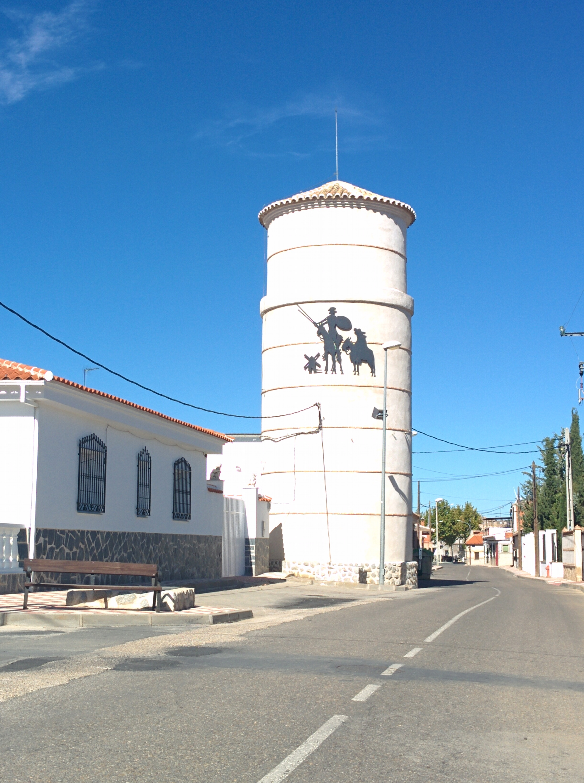 Depósito de agua, en Chueca (Toledo, España).